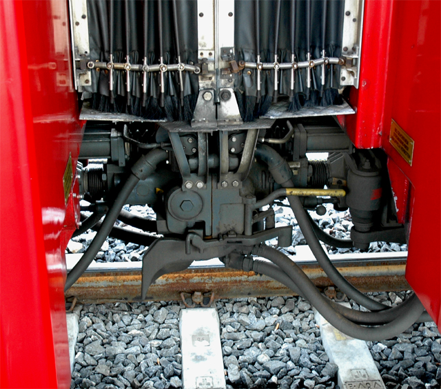 Rhätische Bahn GF koppelingen in treinstel van de serie RhB Be 4/4